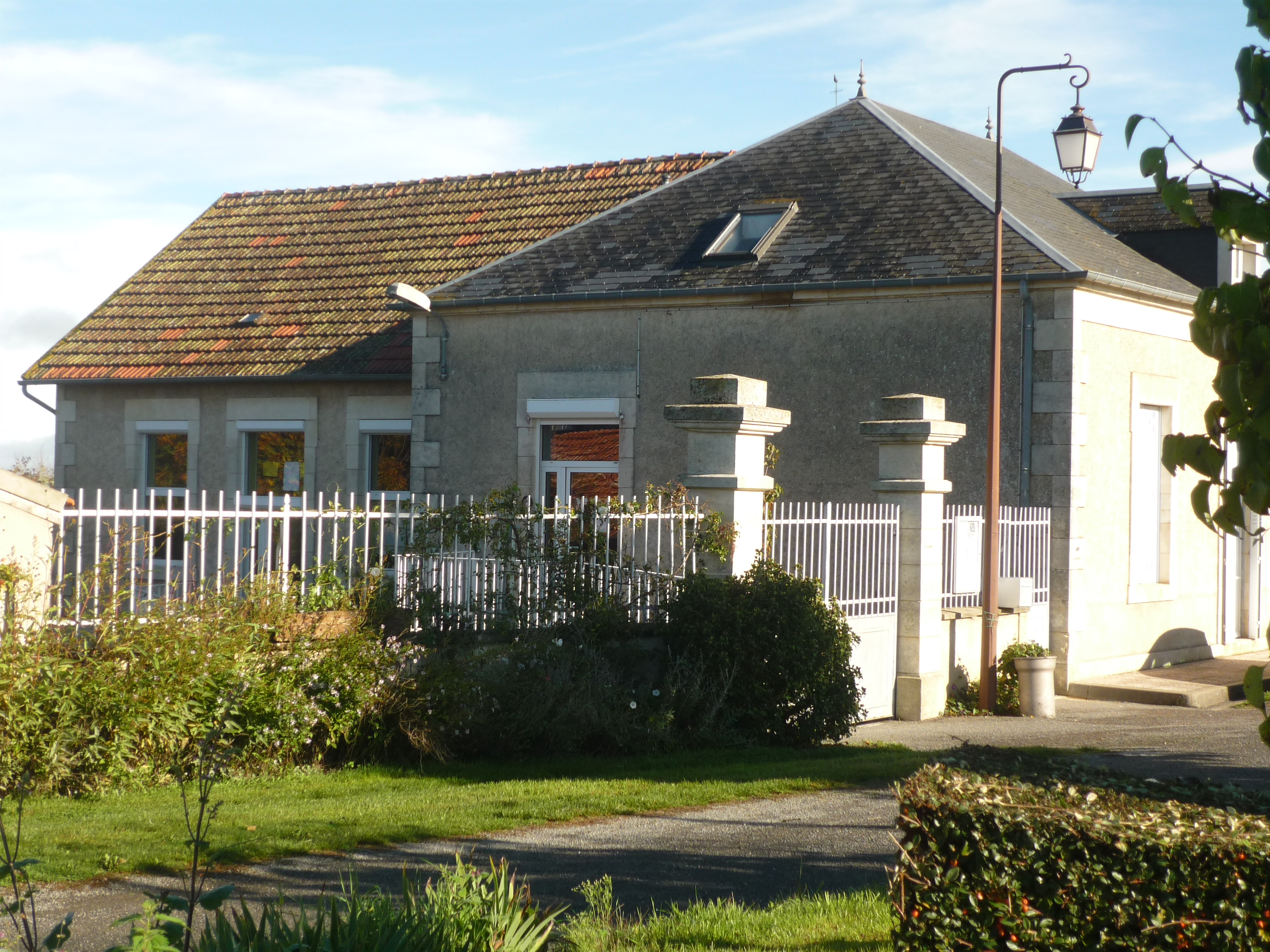 La façade de l'école d'Arcomps